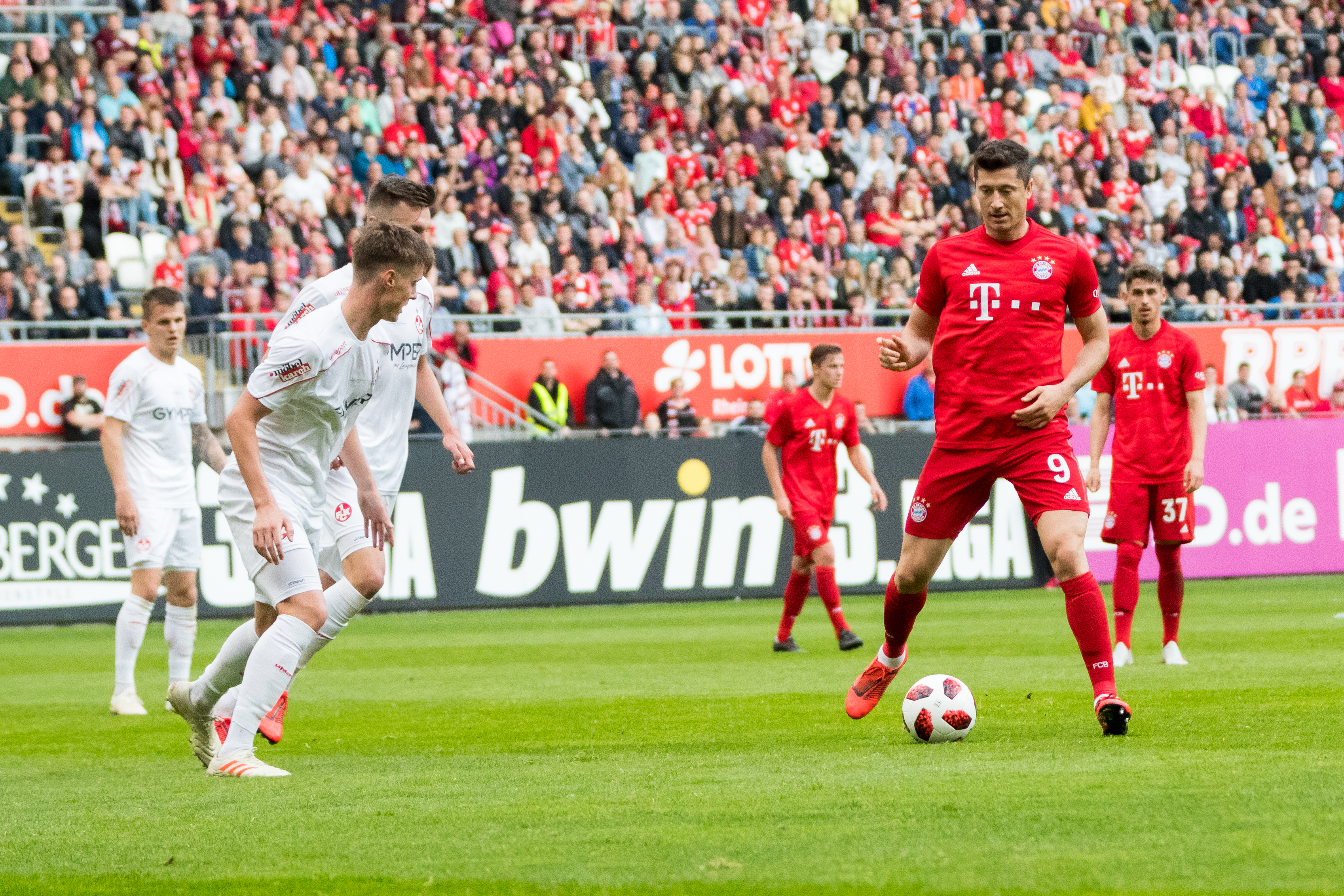 during 1.FC Kaiserslautern vs FC Bayern München at Fritz-Walter-Stadion, Kaiserslautern, Rheinland-Pfalz, Germany on 2019-05-27, Photo: Sven Mandel